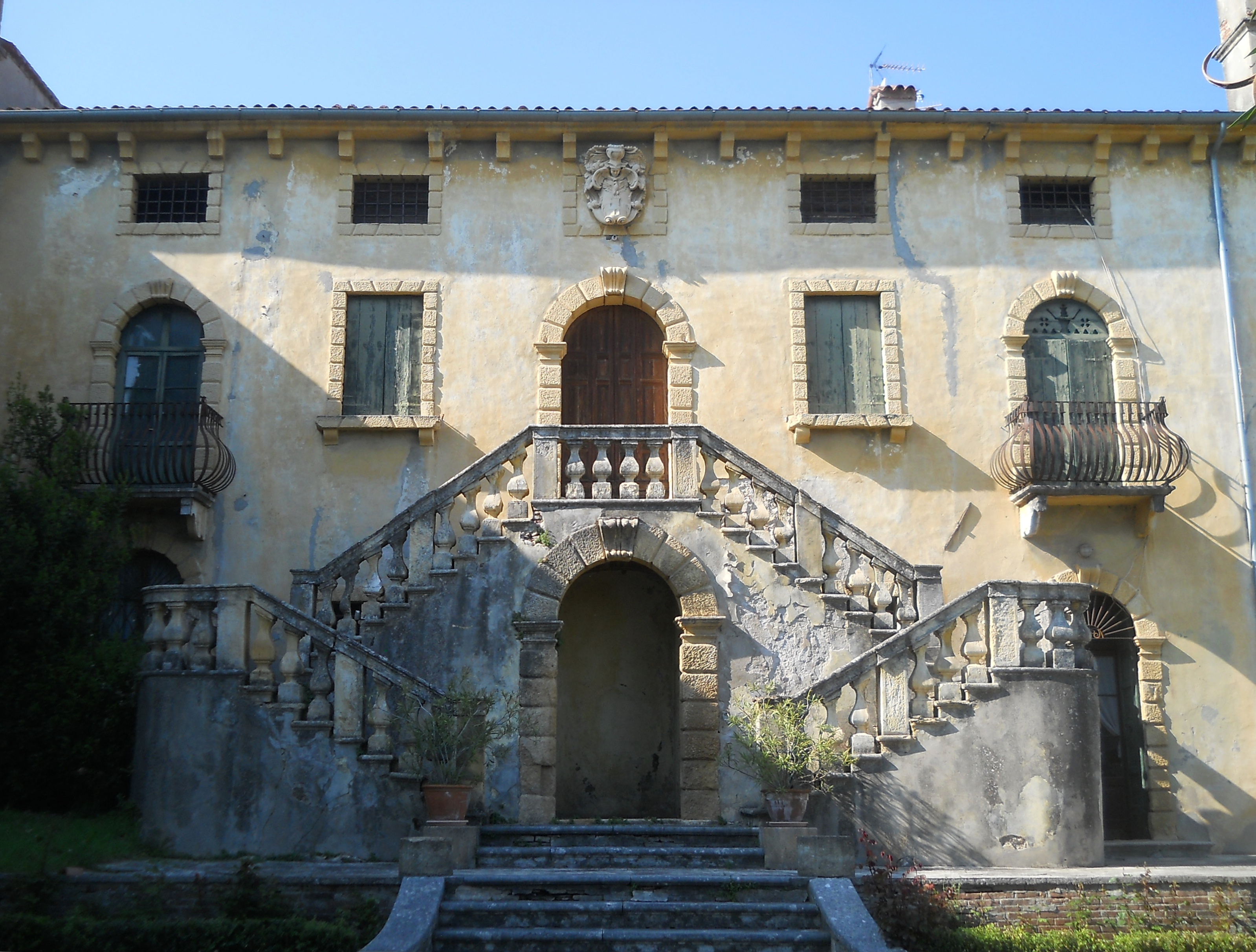 Facciata di Villa Porta, Rizzini in località Canzago a Marano di Valpolicella (provincia di Verona).